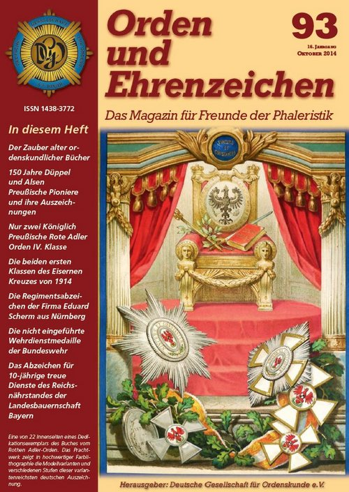 Vereinsmagazin OuE - Titelblattbeispiel - Ausgabe 93